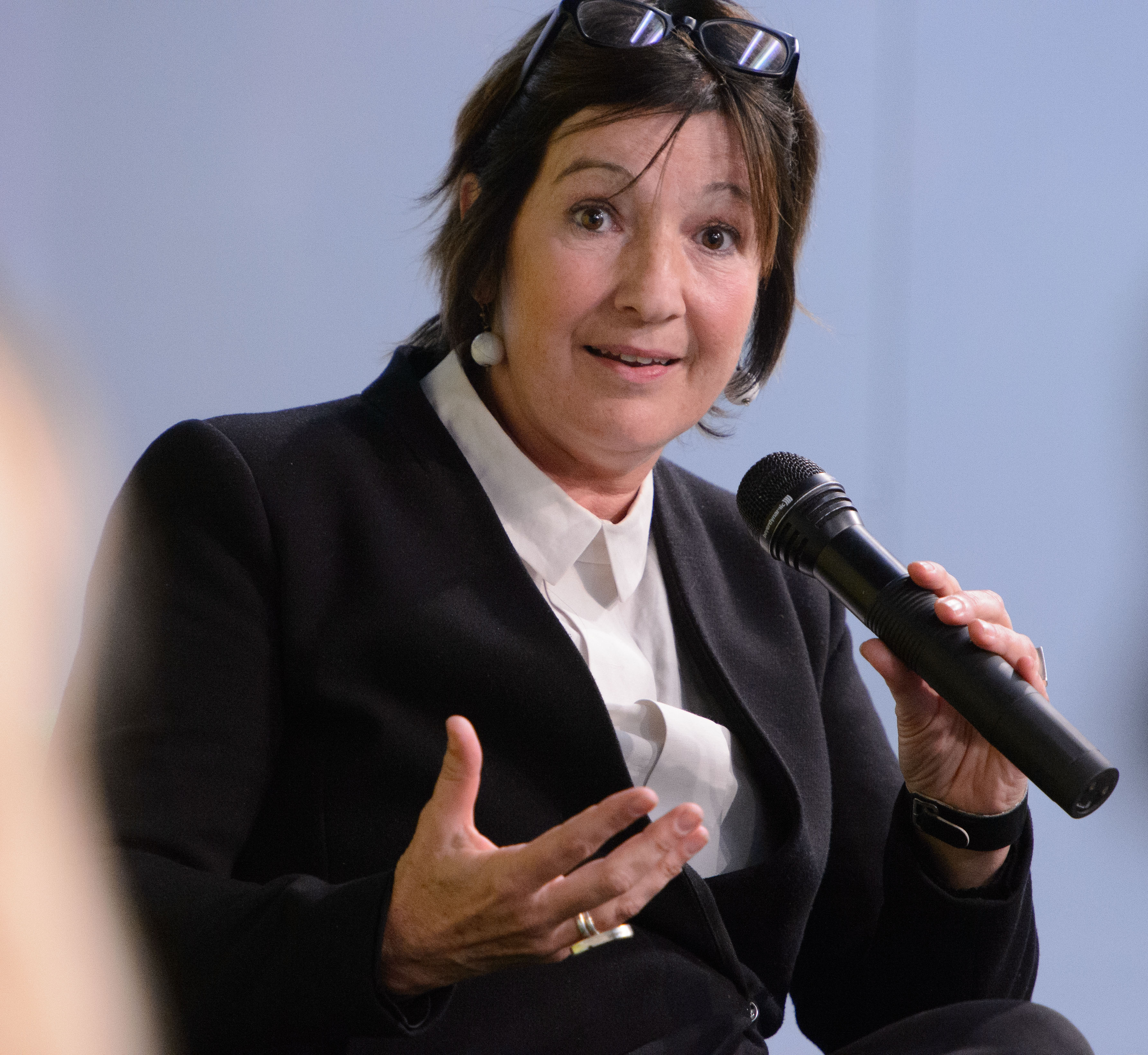 Birgit Virnich